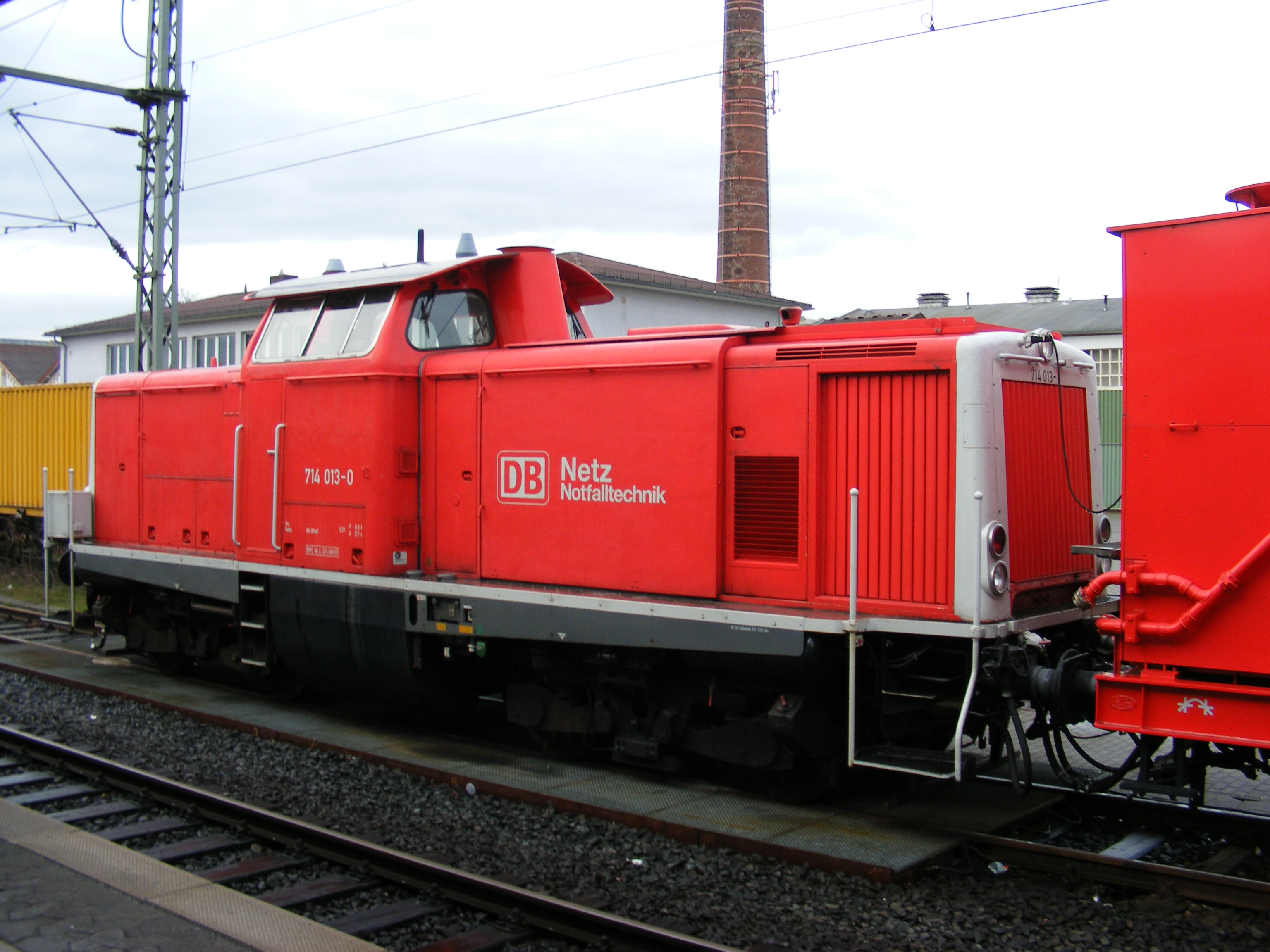 Diesellok Nr. "714 013-0" - DB Netz Notfalltechnik (Fulda) ex 714 352-2 bzw. 212 352-9[1], Teil eines Rettungszuges